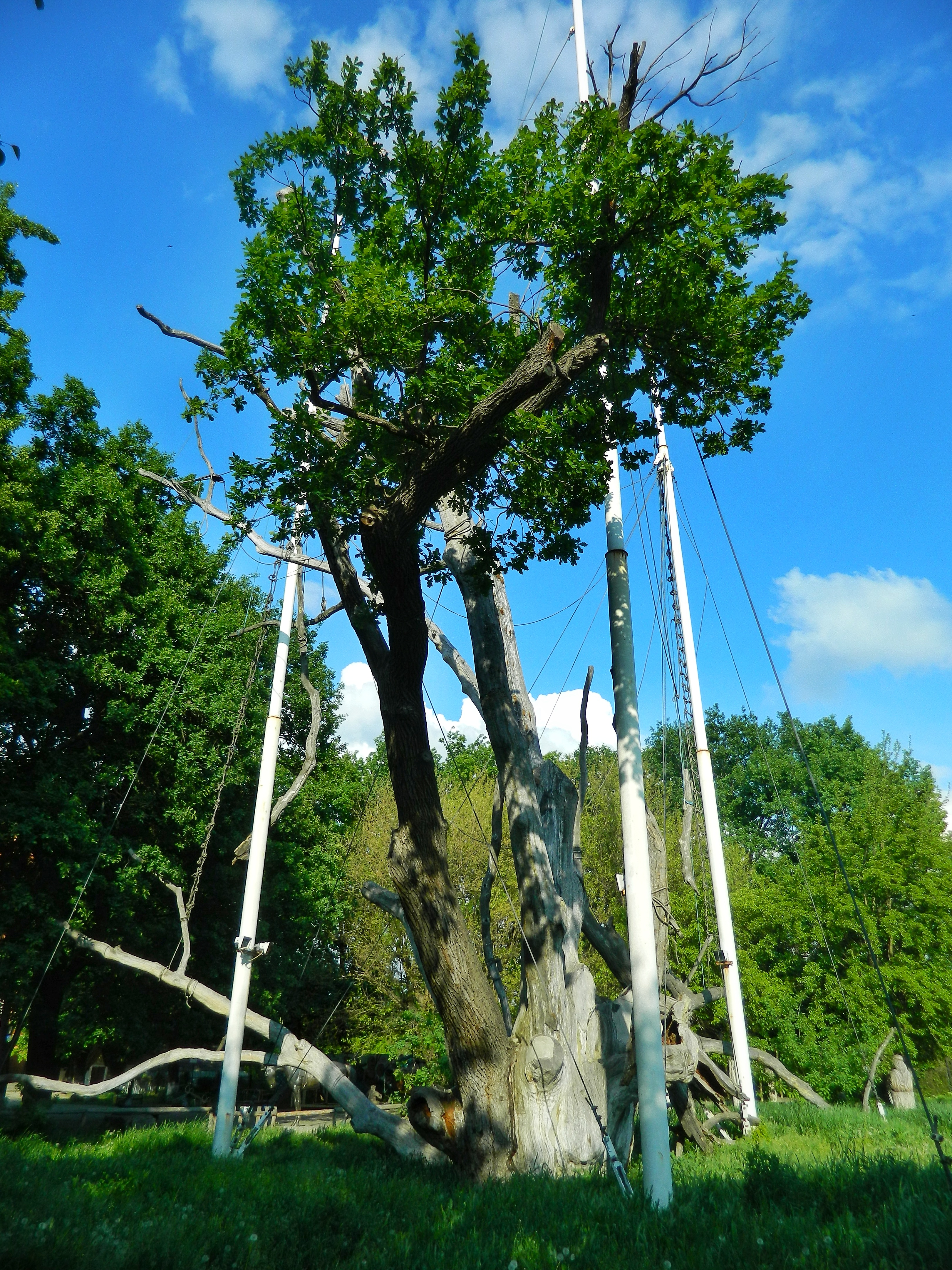 «Запорозький 700-річний дуб», м.Запоріжжя